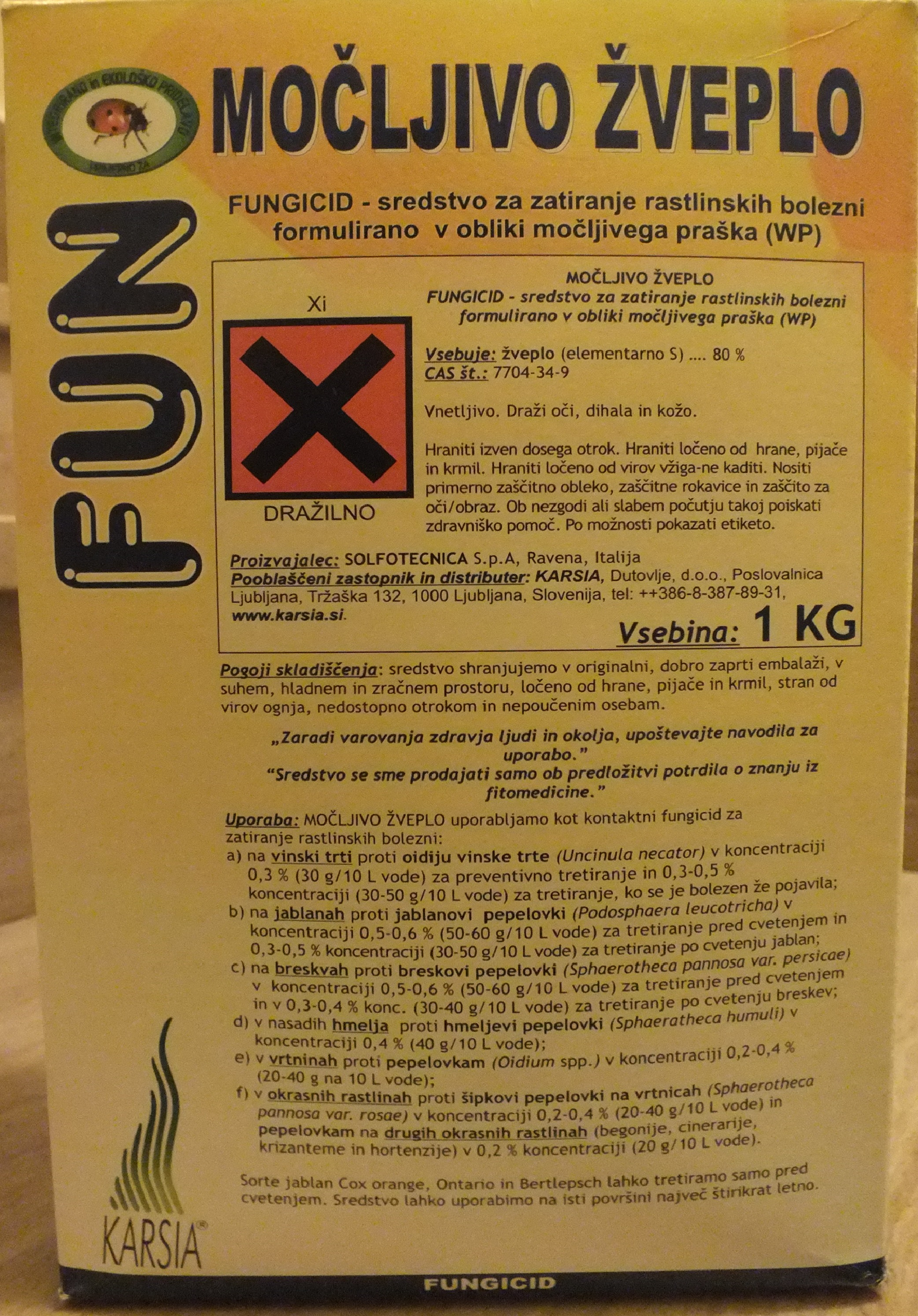 Močljivo žveplo v originalni embalaži.